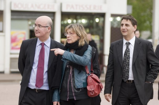 Le préfet de Seine-Saint-Denis Nacer Meddah (à gauche) à Aubervilliers accompagné de la conseillère générale Évelyne Yonnet et du député Daniel Goldberg.